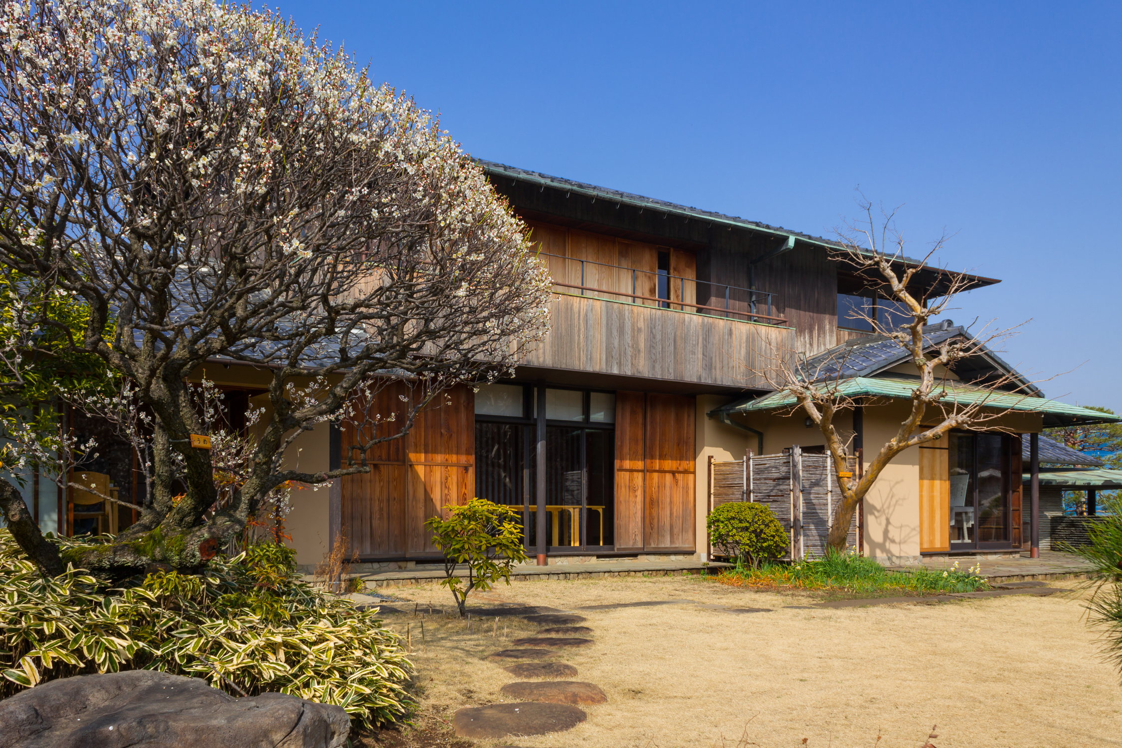 杉並区立角川庭園（国の登録有形文化財）、角川源義の元自邸。